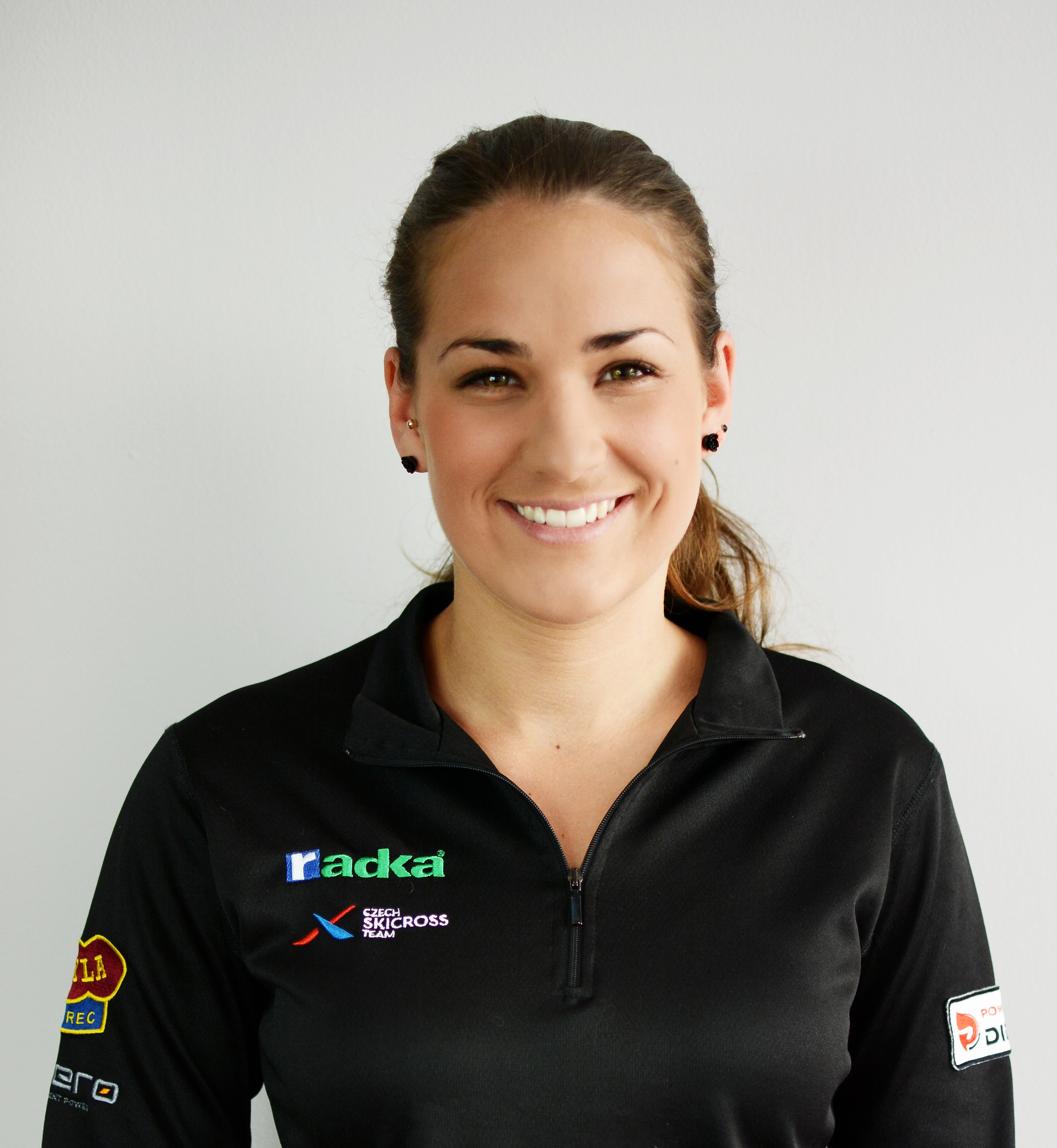 photo